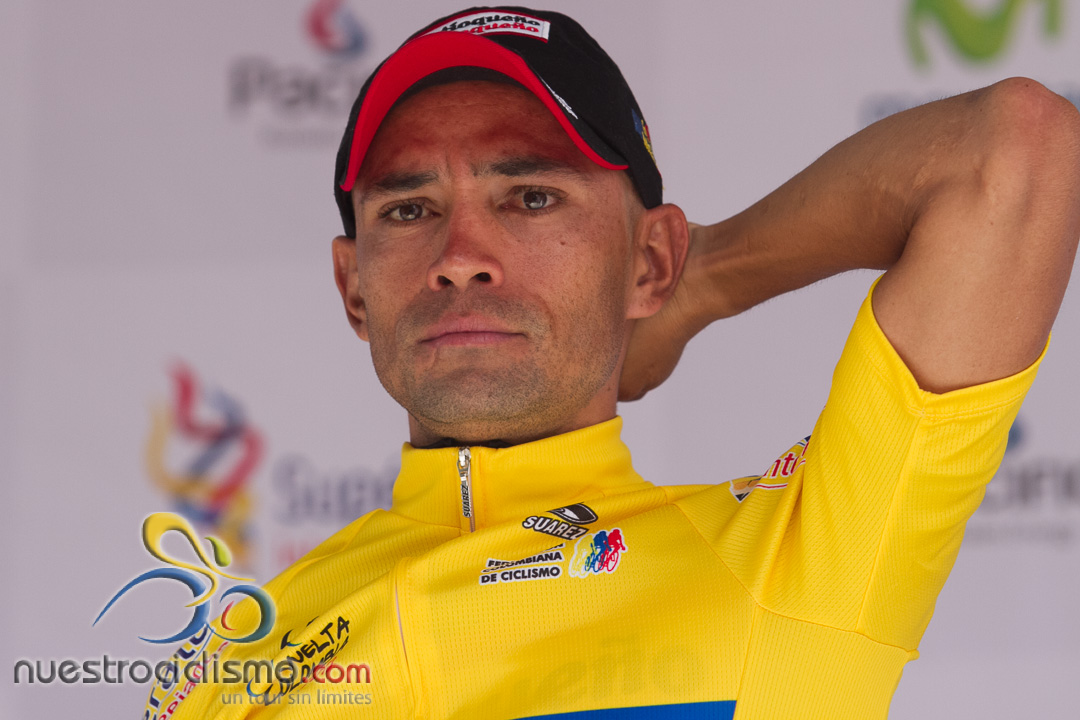 Mauricio Ortega 12ª. Eta. Vuelta a Colombia 2013 Viernes 21 de junio de 2013 Doradal - Medellín (174Km)